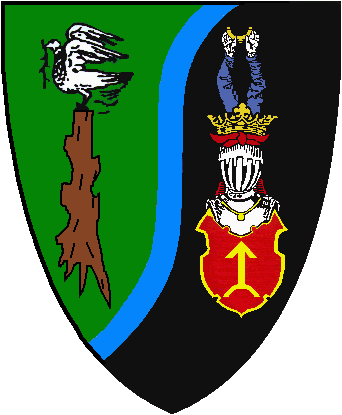 Herb gminy wiejskiej Golub-Dobrzyń